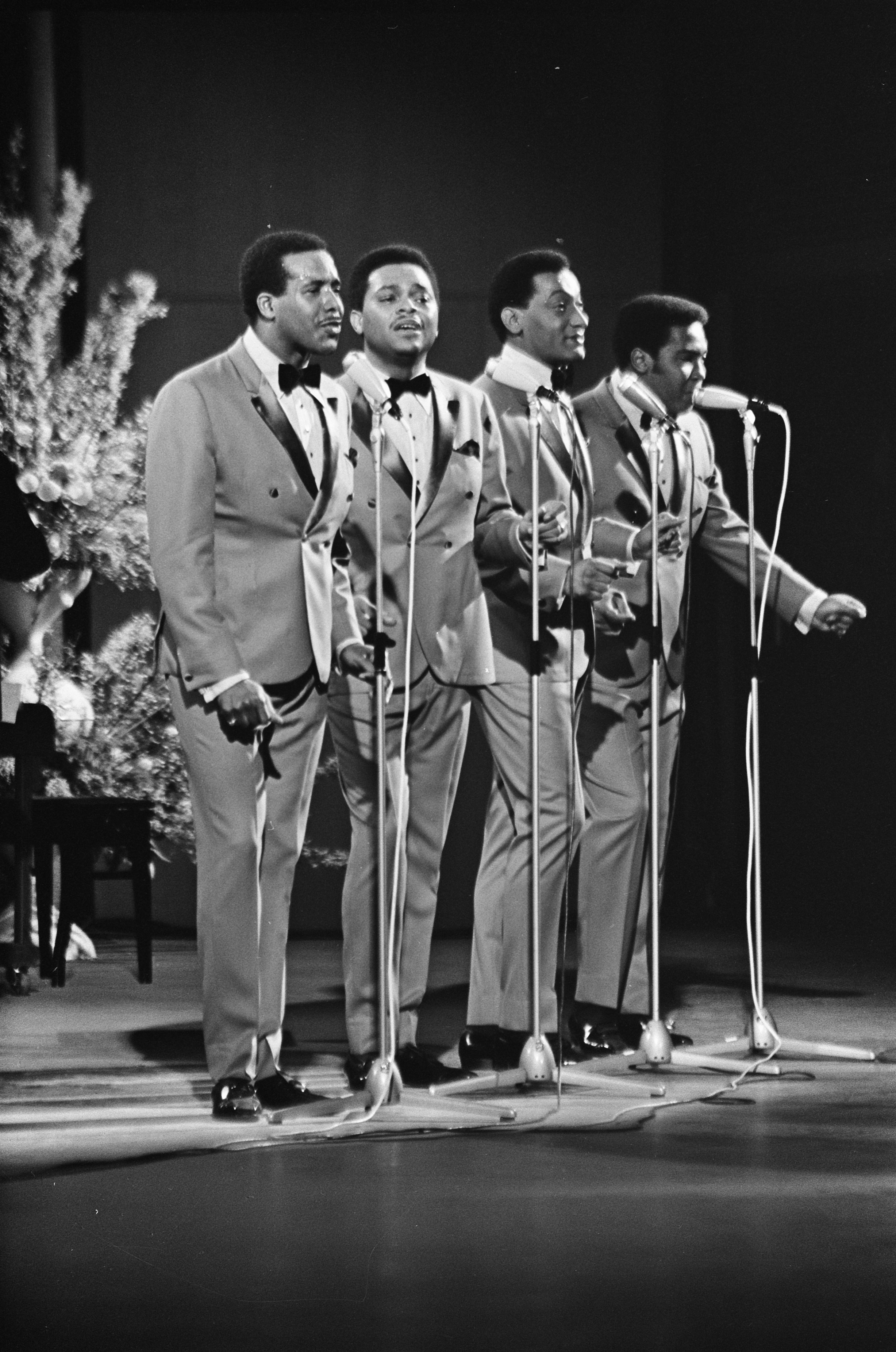 Collectie / Archief : Fotocollectie Anefo Reportage / Serie : [ onbekend ] Beschrijving : Grand Gala du Disque . The Four Tops Datum : 8 maart 1968 Trefwoorden : zangers Fotograaf : Kroon, Ron / Anefo Auteursrechthebbende : Nationaal Archief Materiaalsoort : Negatief (zwart/wit) Nummer archiefinventaris : bekijk toegang 2.24.01.05 Bestanddeelnummer : 921-1504 Reacties Geplaatst door Maaike op 07 maart 2014 - 18:47. Locatie: RAI-congrescentrum Plaats: Amsterdam, Noord-Holland